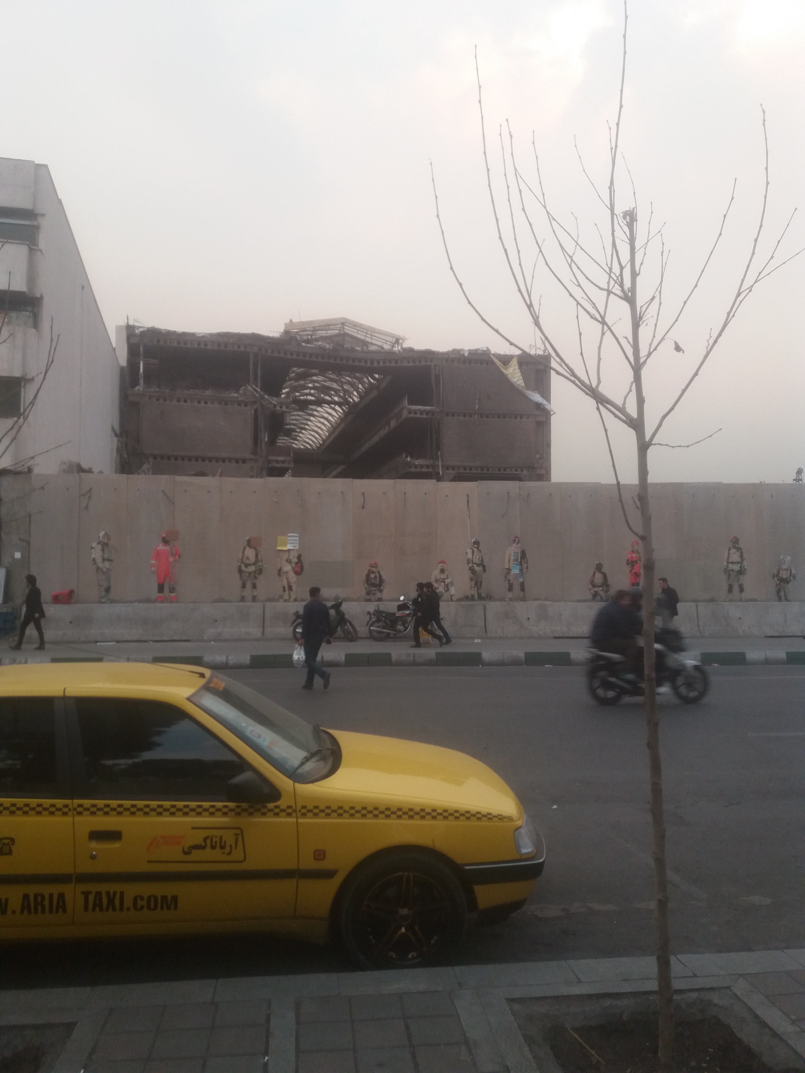 نمایی از بقایای ساختمان پلاسکو، بهمن ۱۳۹۶